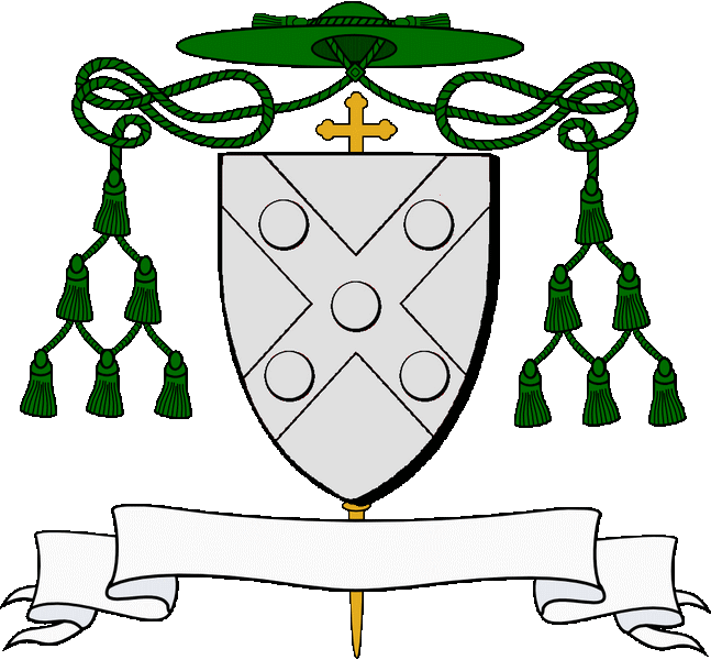 dougen a ra ul lammell karget gant pemp bezantenn; livioù disanvet